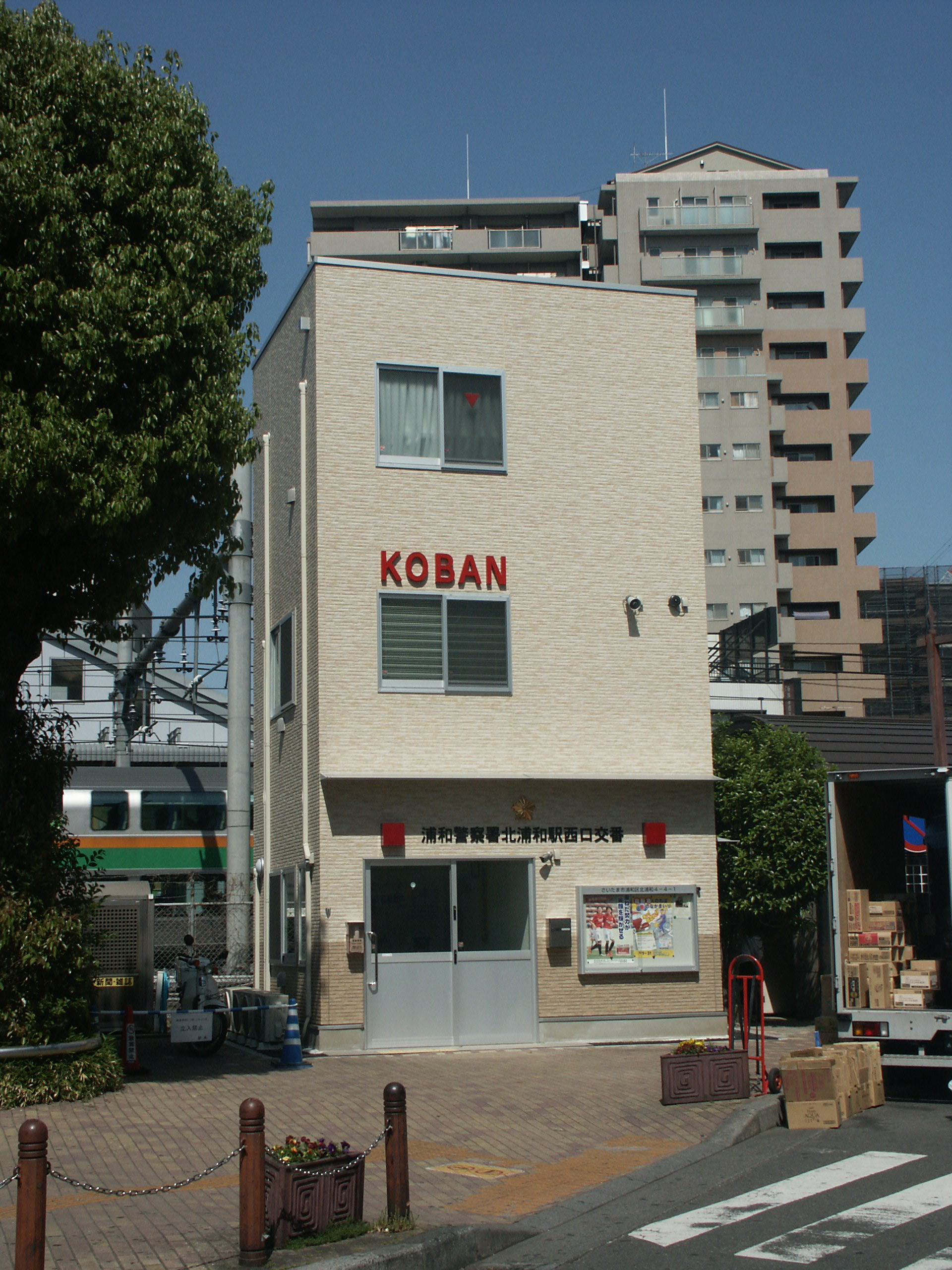 さいたま市浦和区にある浦和警察署北浦和駅西口交番